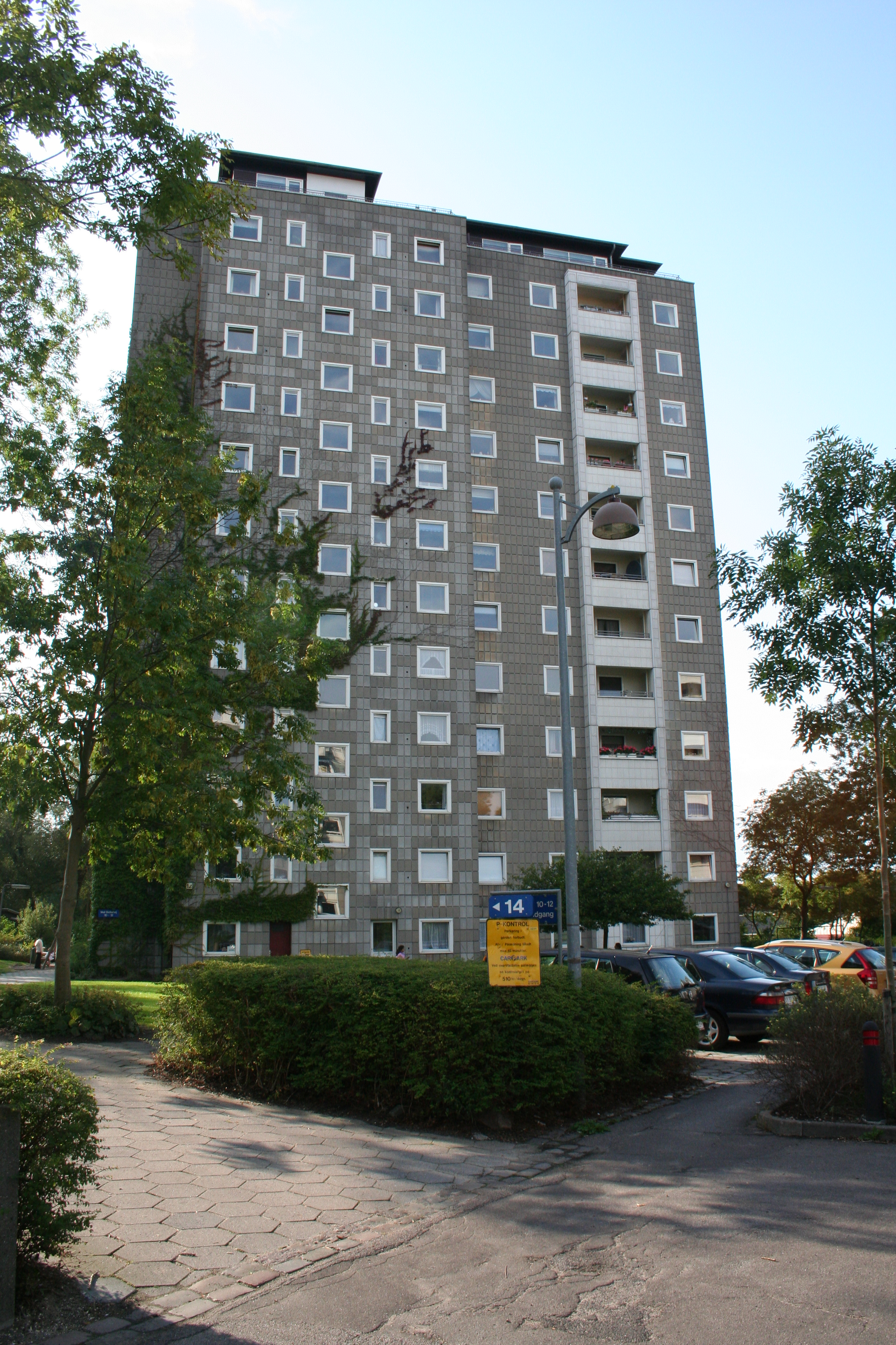 Højhusene Ved Bellahøj